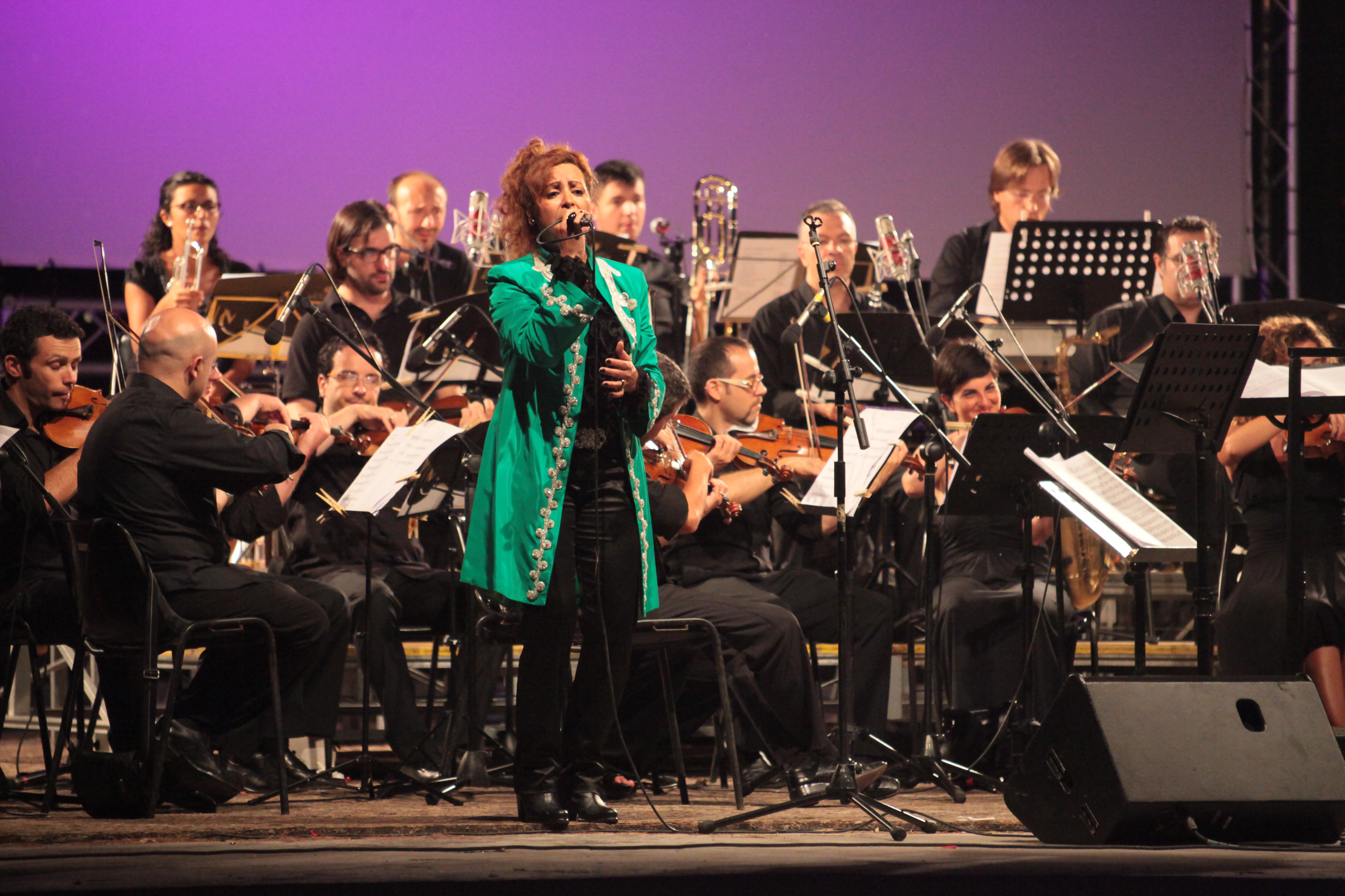 Concierto "Ritmo de Cuba",en vivo con la Orquesta Sinfonica de la Magna Grecia.